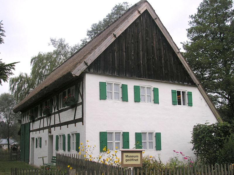 Bauernhausmuseum Staudenhaus (Oberschönenfeld, Landkreis Augsburg, Bayern). Gesamtansicht. Eigene Aufnahme, Sept. 2006 / Open air museum Staudenhaus (Oberschoenenfeld near Augsburg, Bavaria, Germany). Total view. Own photo, Sept. 2006